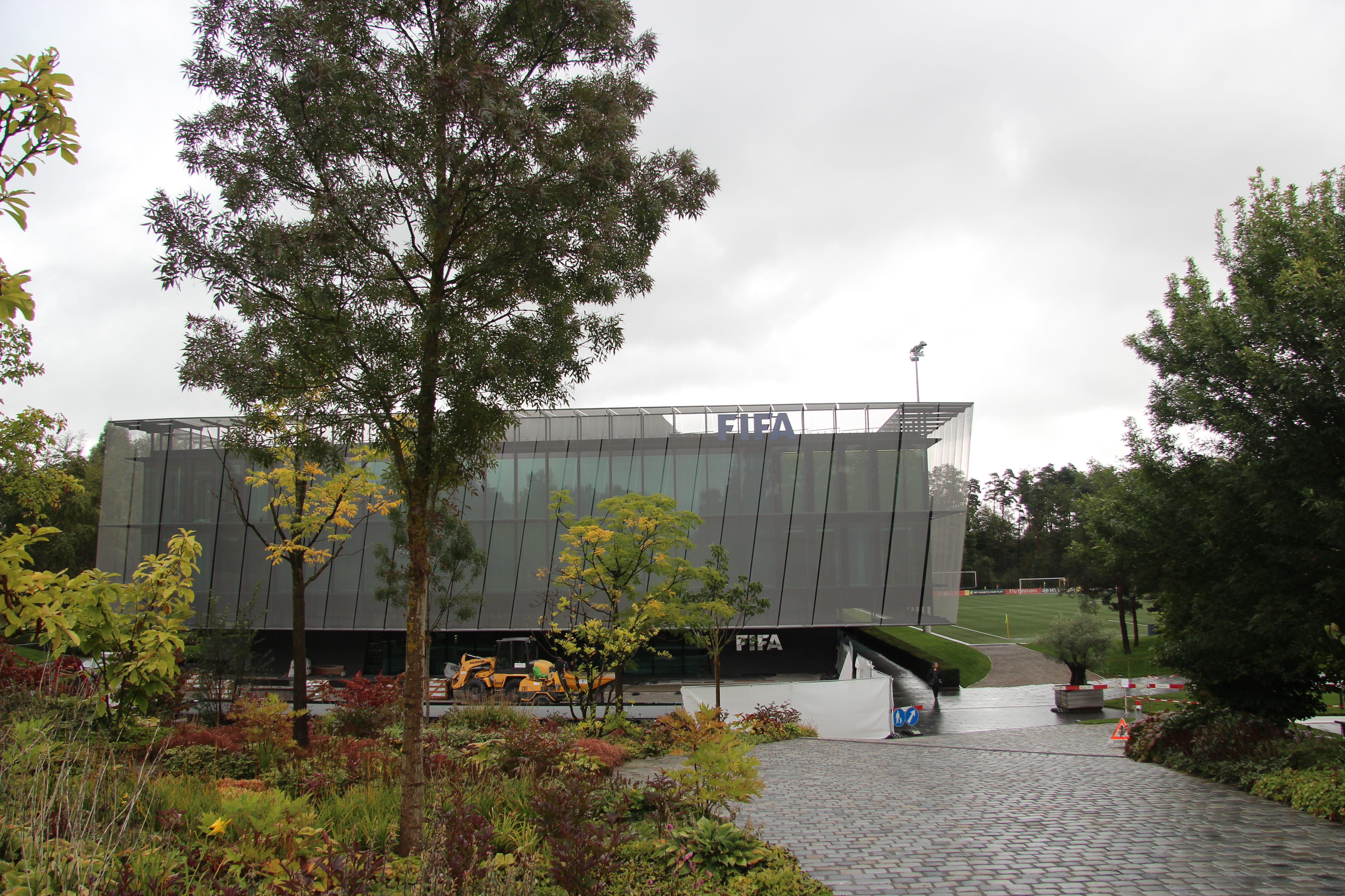 FIFA-hoofdkantoor in Zürich, Zwitserland.